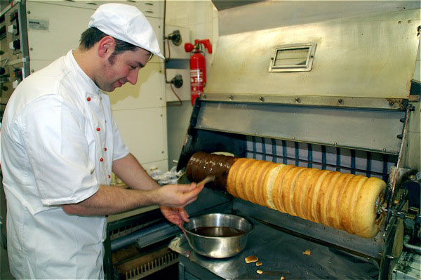 Baumkuchen-Produktion